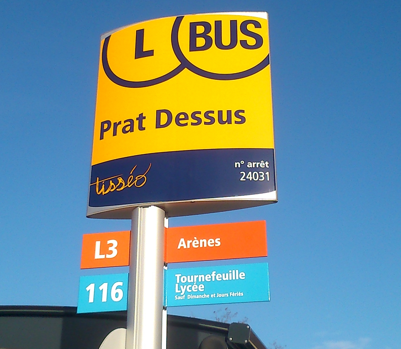 Le totem de la station Prat Dessus des lignes L3 et 116 du réseau Linéo et des bus de Toulouse